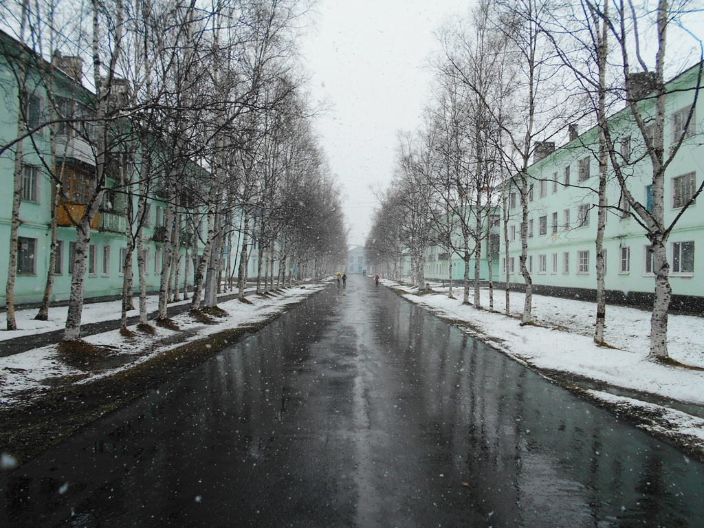 Монгохто - середина мая